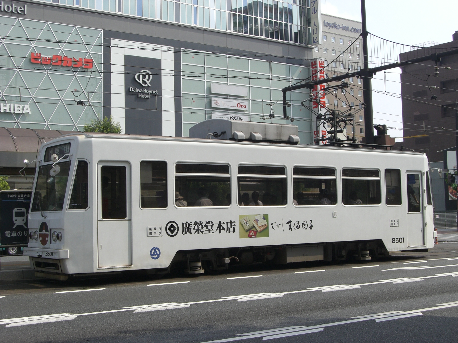 岡山電気軌道7900形8501 (最終増備の8501のみ冷房装置が異なる)